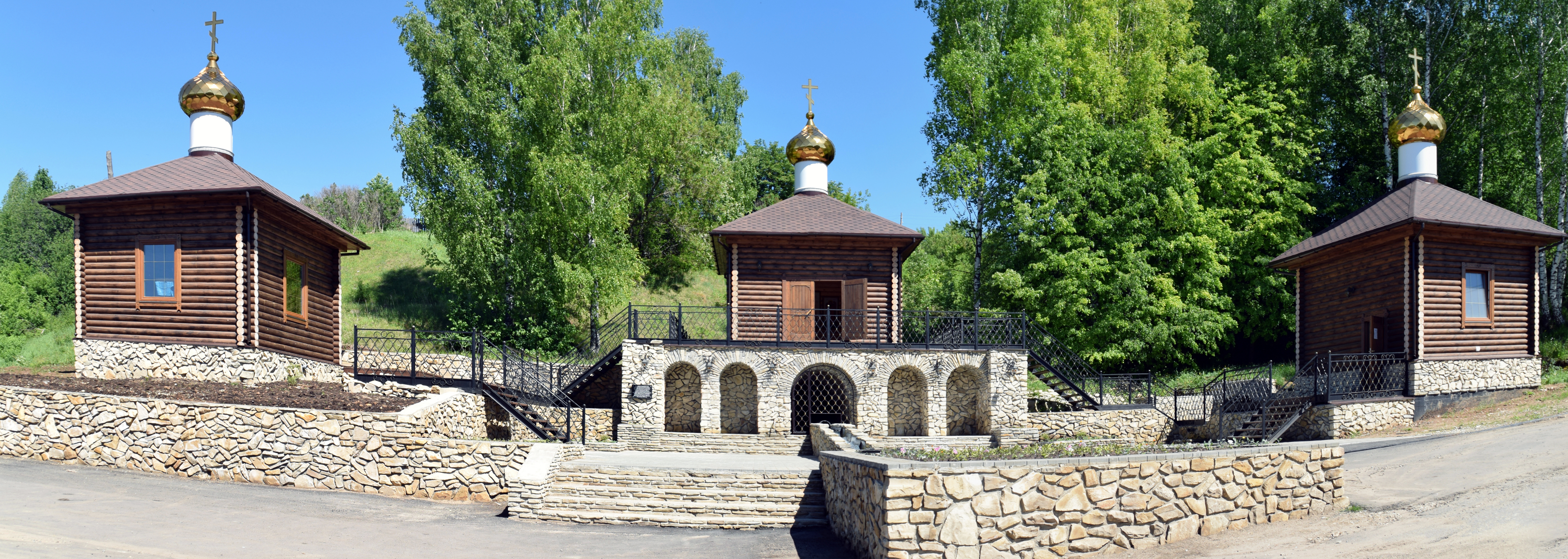 Смоленцевский родник: Советский район, Кировская область This image is related to the protected area of Russia number 4310246